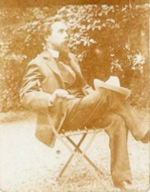 Francisco de Lacerda, an Azorean musician.